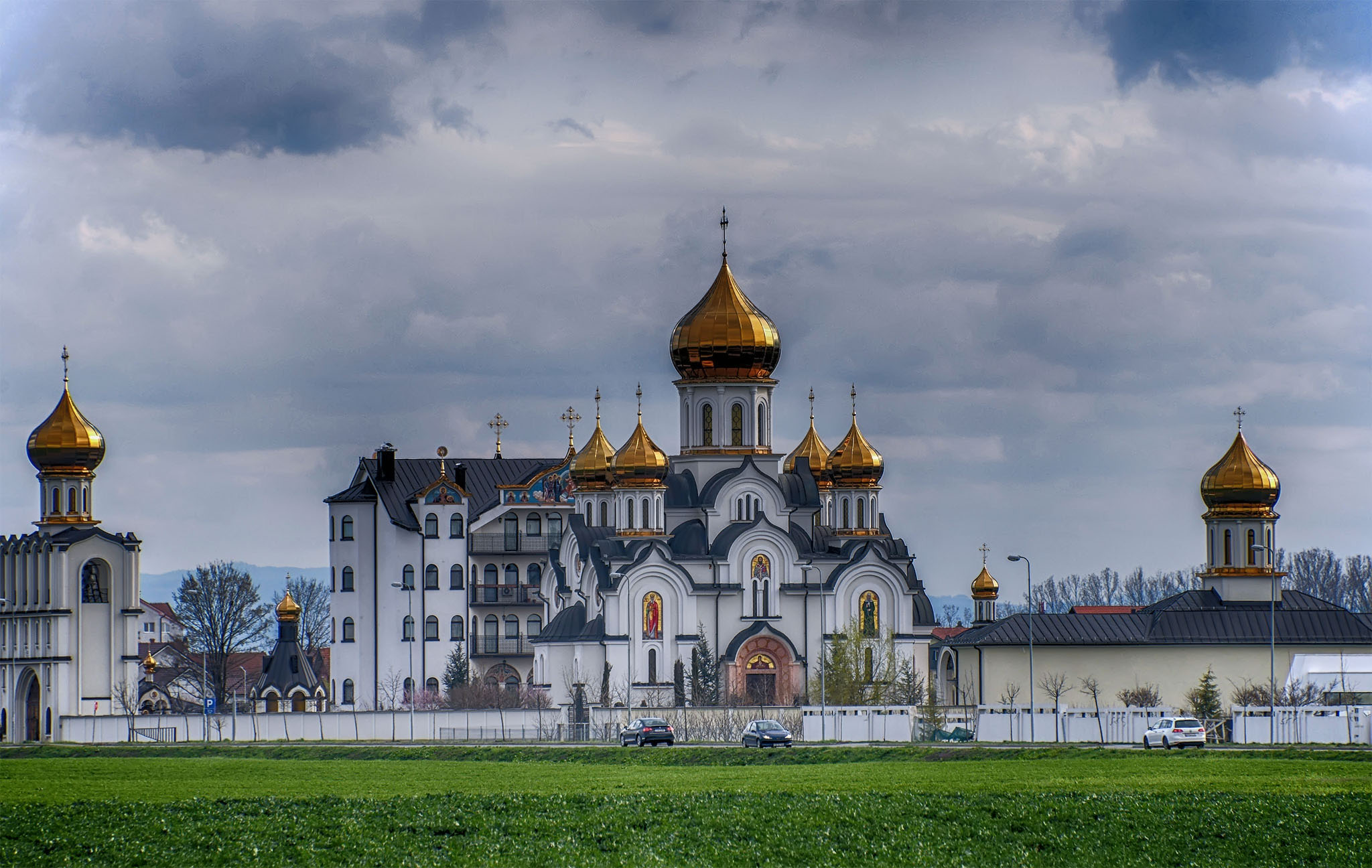 Манастир Свете Петке у Бијељини.